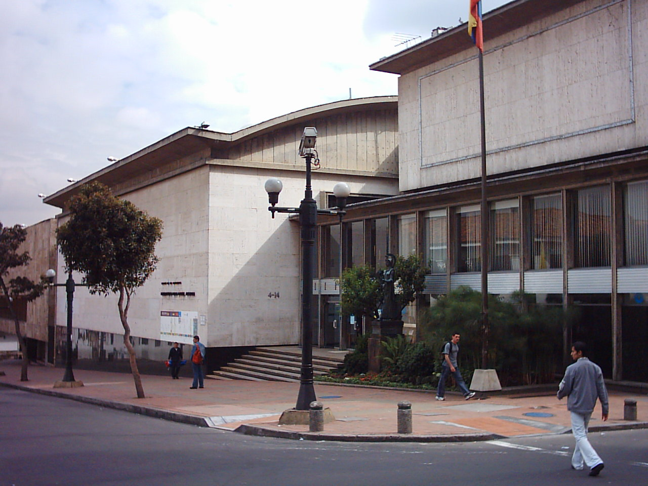 Luis-Angel Arango library in Bogota